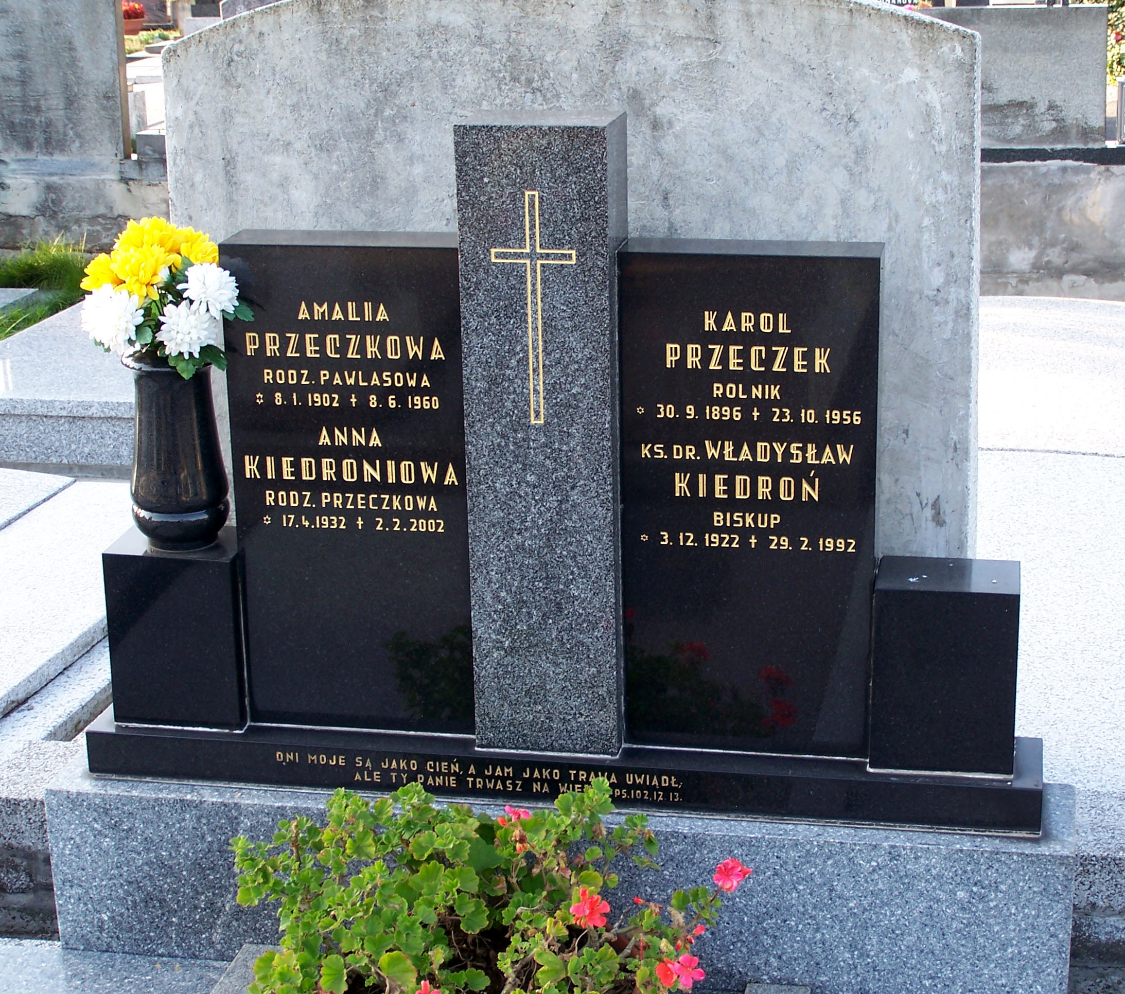 Grave of Bishop Władysław Kiedroń in Dolní Bludovice (Błędowice Dolne), Czech Republic.